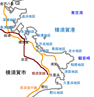 横須賀港の地図。横須賀港の港湾区域は北から追浜、深浦、長浦、本港、新港、平成、大津、馬堀、走水、鴨居、浦賀、久里浜、野比の各地区に分けられる。投稿者作成。